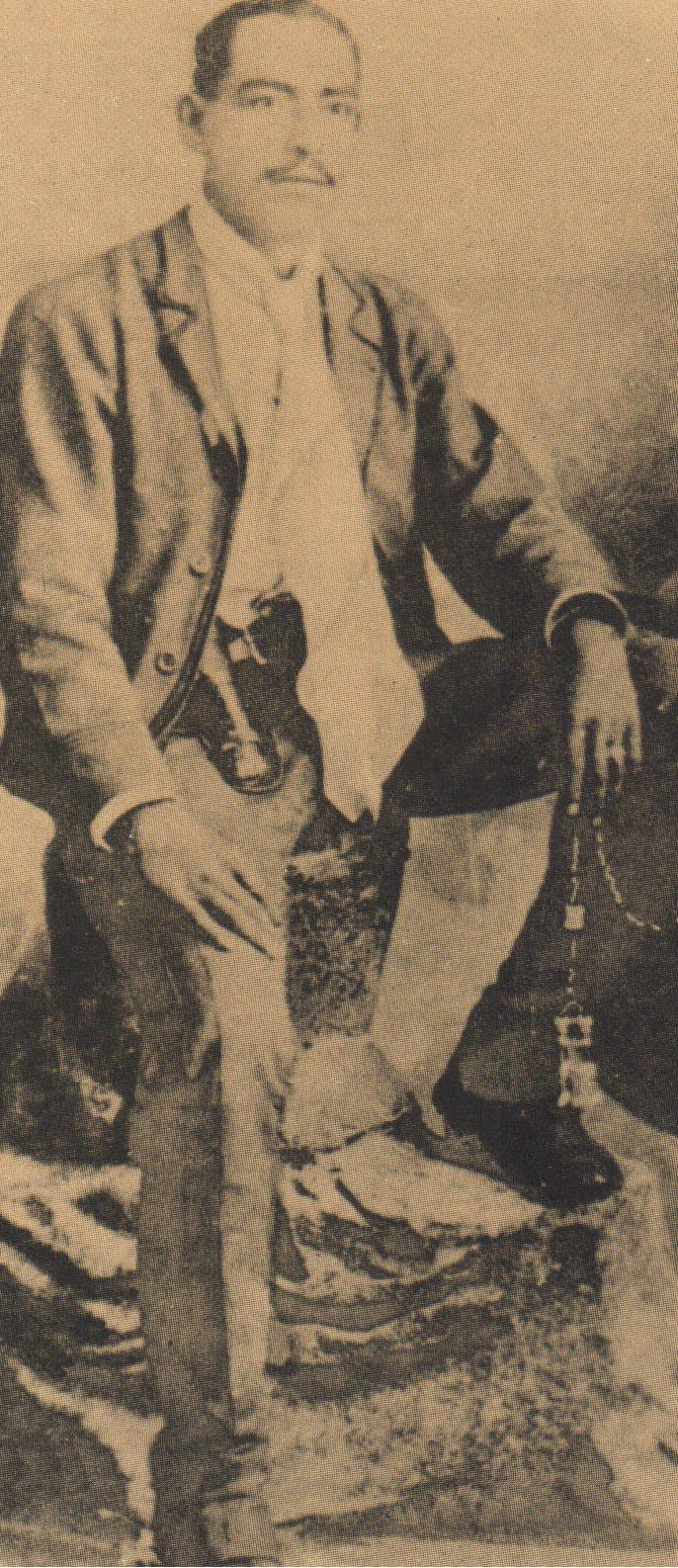 General Eusebio Jáuregui Nolasco